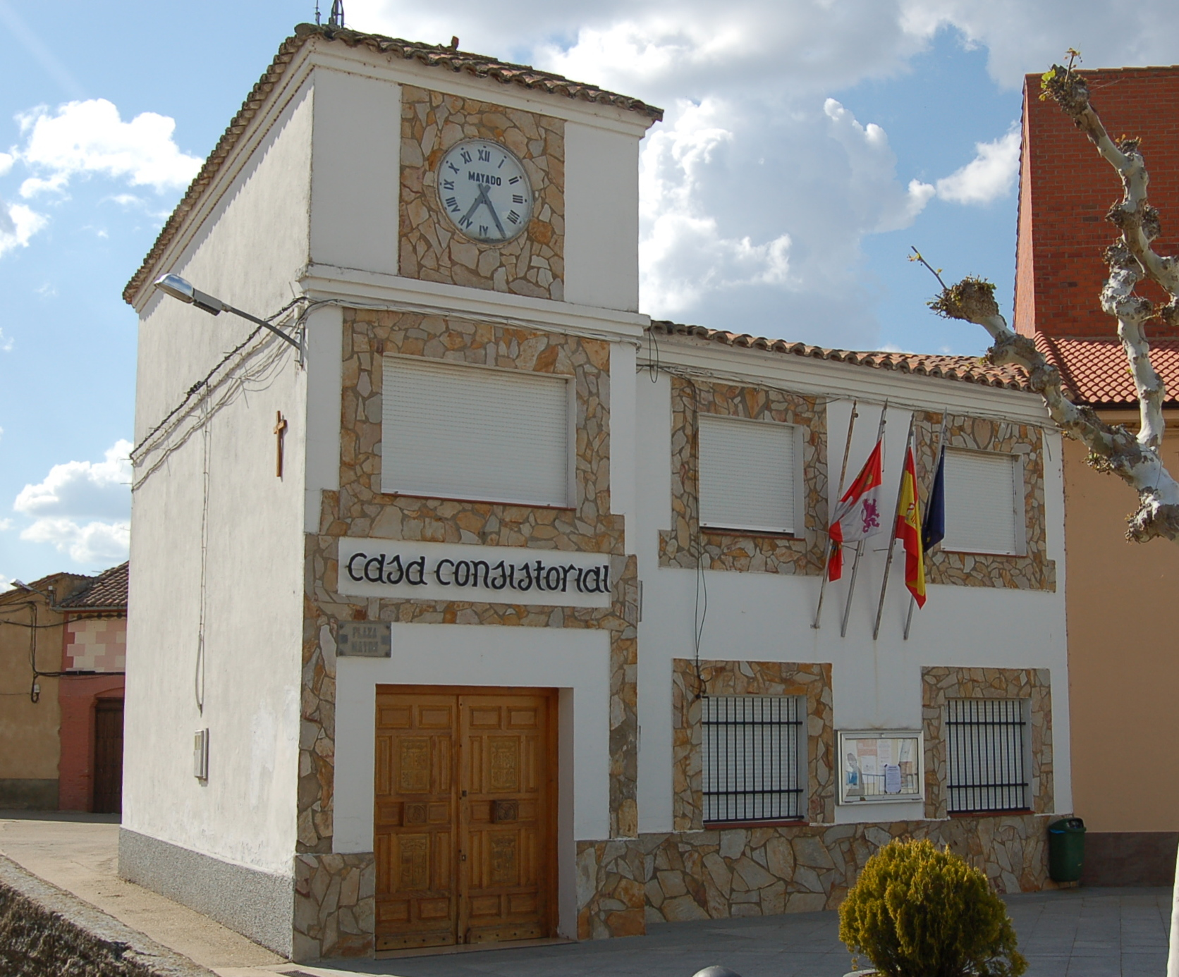 Casa consistorial Burganes de Valverde